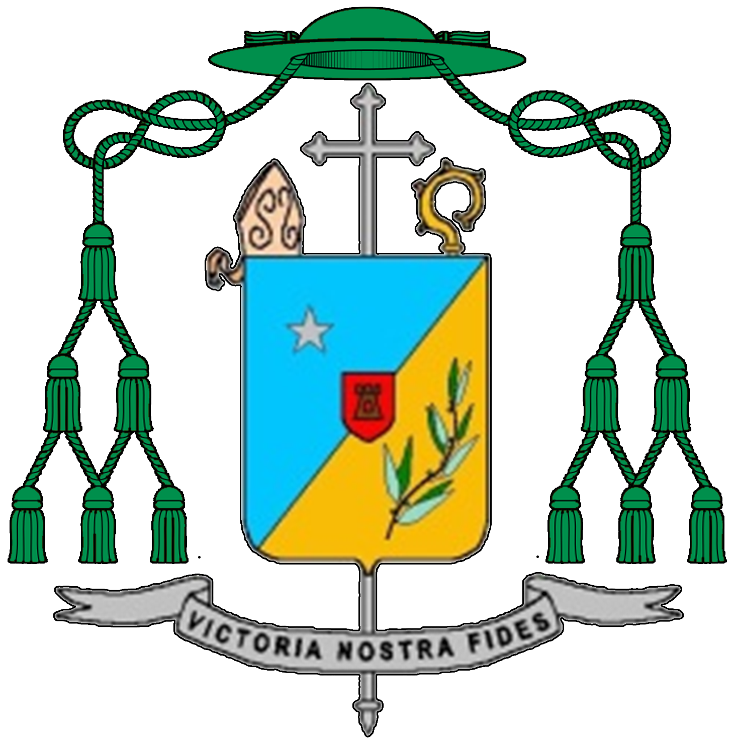 Escudo episcopal de monseñor José Hernán Sánchez Porras